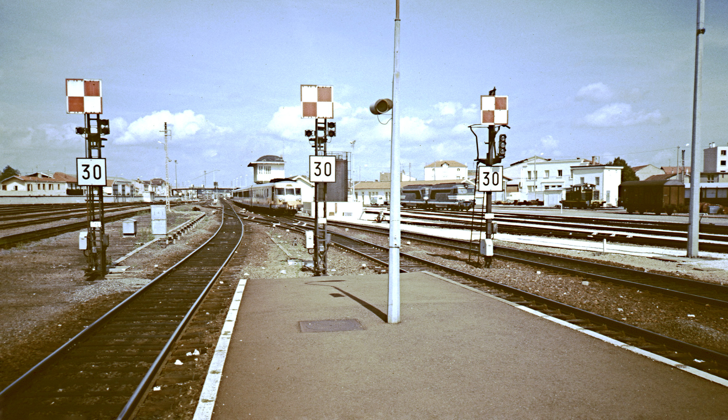 Bahnhof Roanne, Nordkopf mit RTG-Triebzug